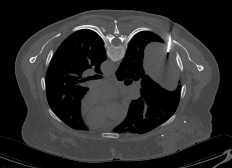 Tumeur fibreuse solitaire de la plèvre.